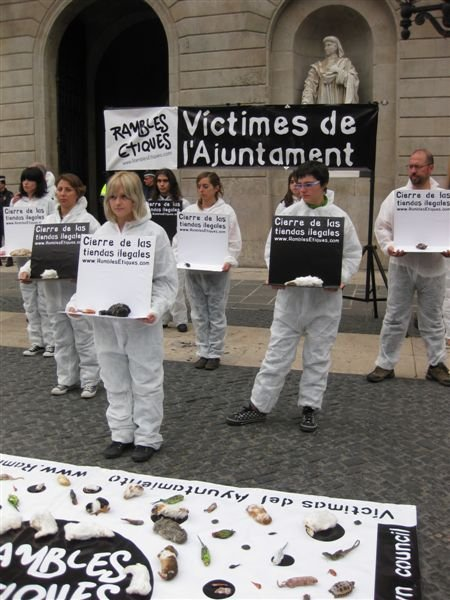 180 animales muertos, procedentes de la basura de las pajarerías de la Rambla, expuestos delante del Ayuntamiento de Barcelona. 180 dead animals from the garbage of the bird shops on the Rambla, displayed in front of the Municipality of Barcelona.